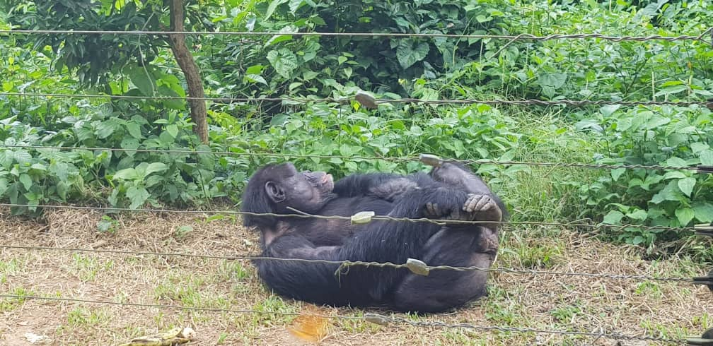 Mefou primate sanctuary